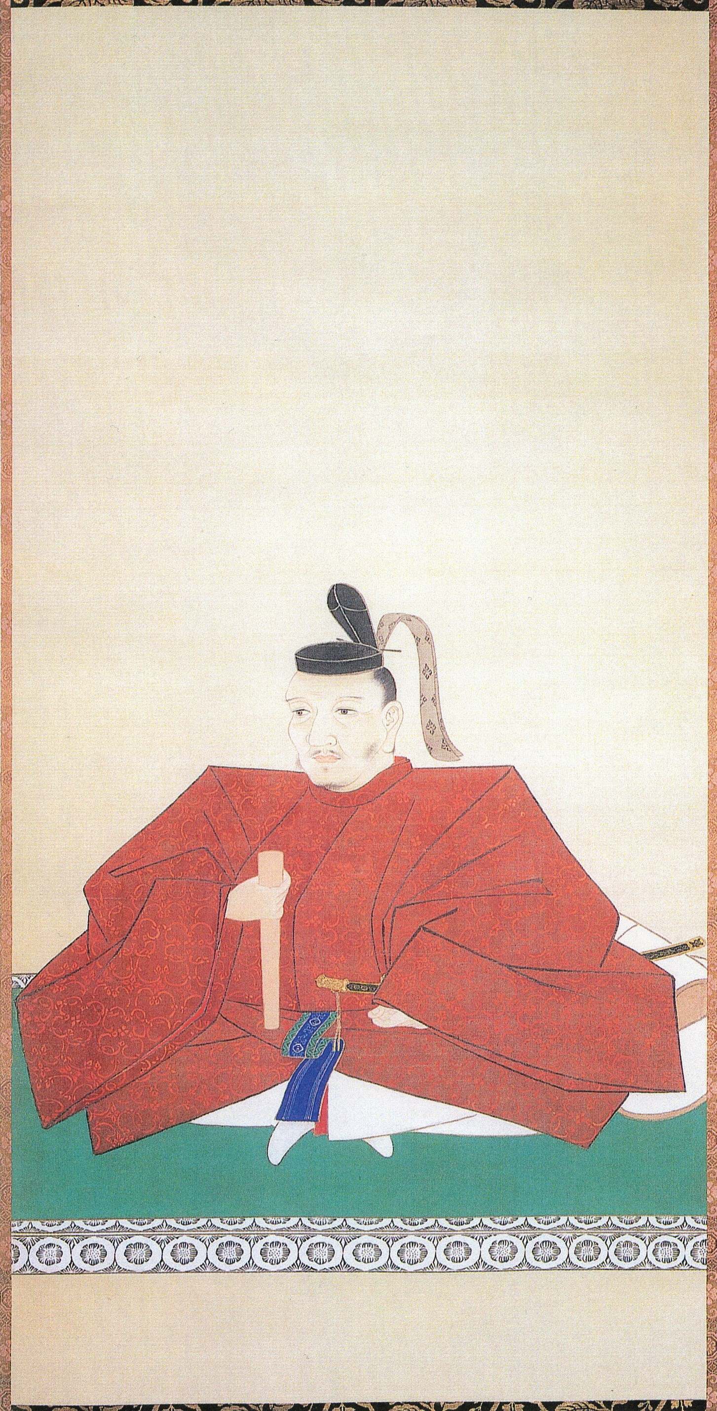 稲葉正勝の肖像。